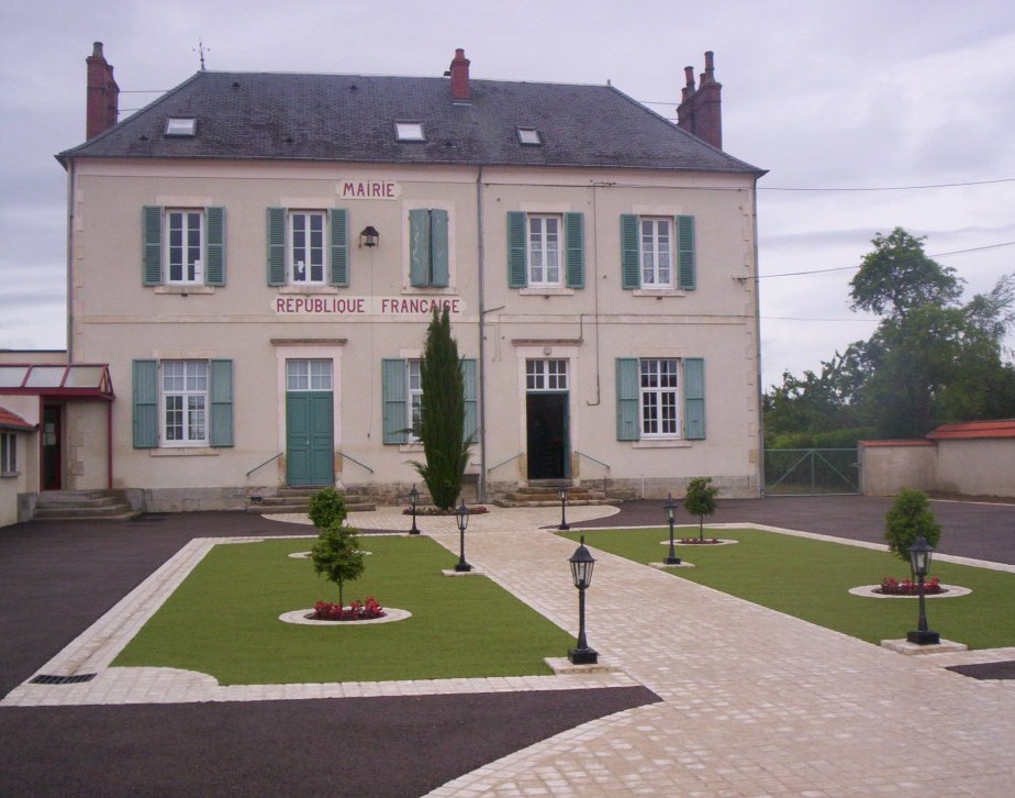 Mairie de Mornay-sur-Allier